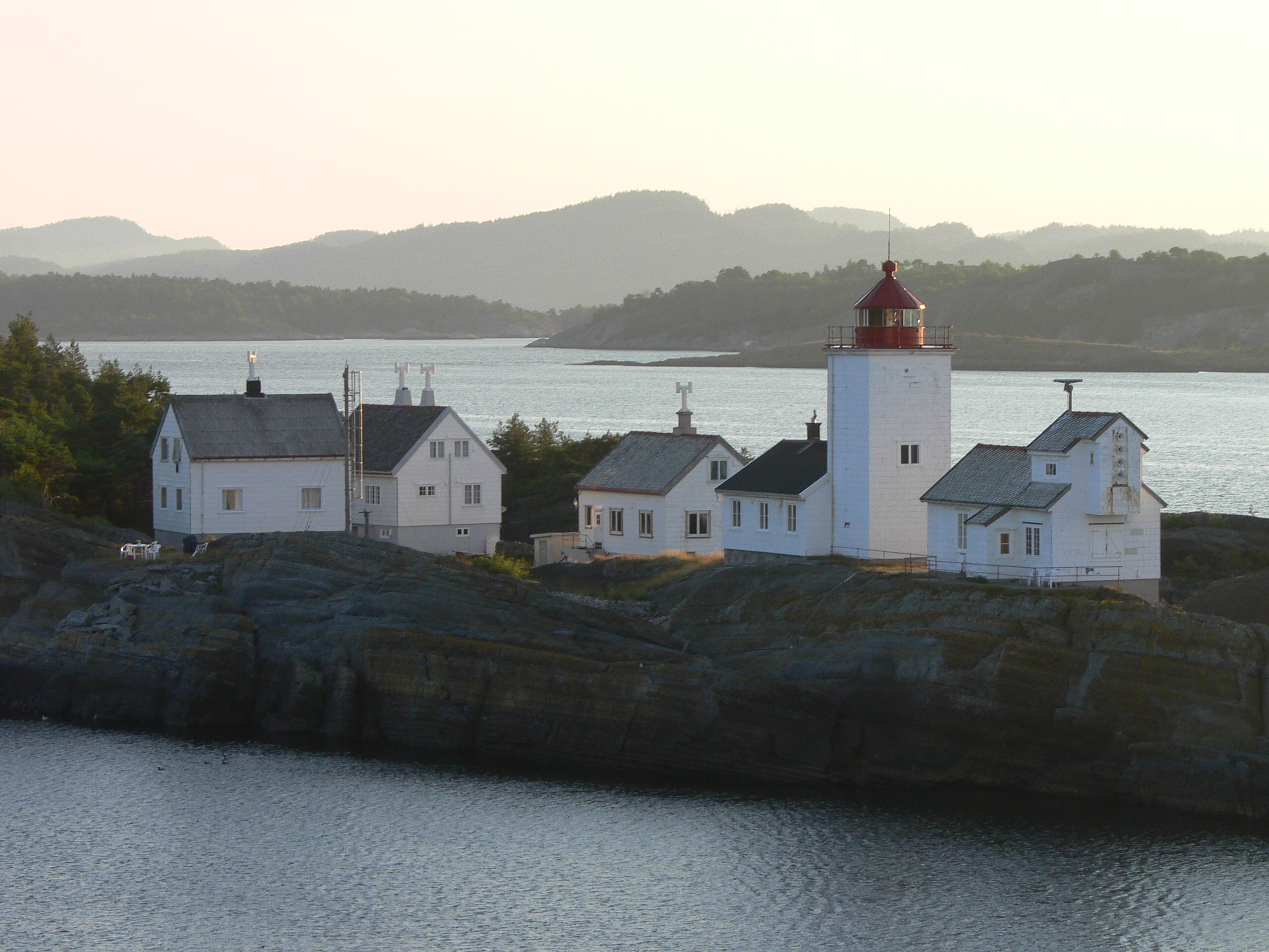 no: Langøytangen fyrstasjon Der Leuchtturm (?) vor Langesund.